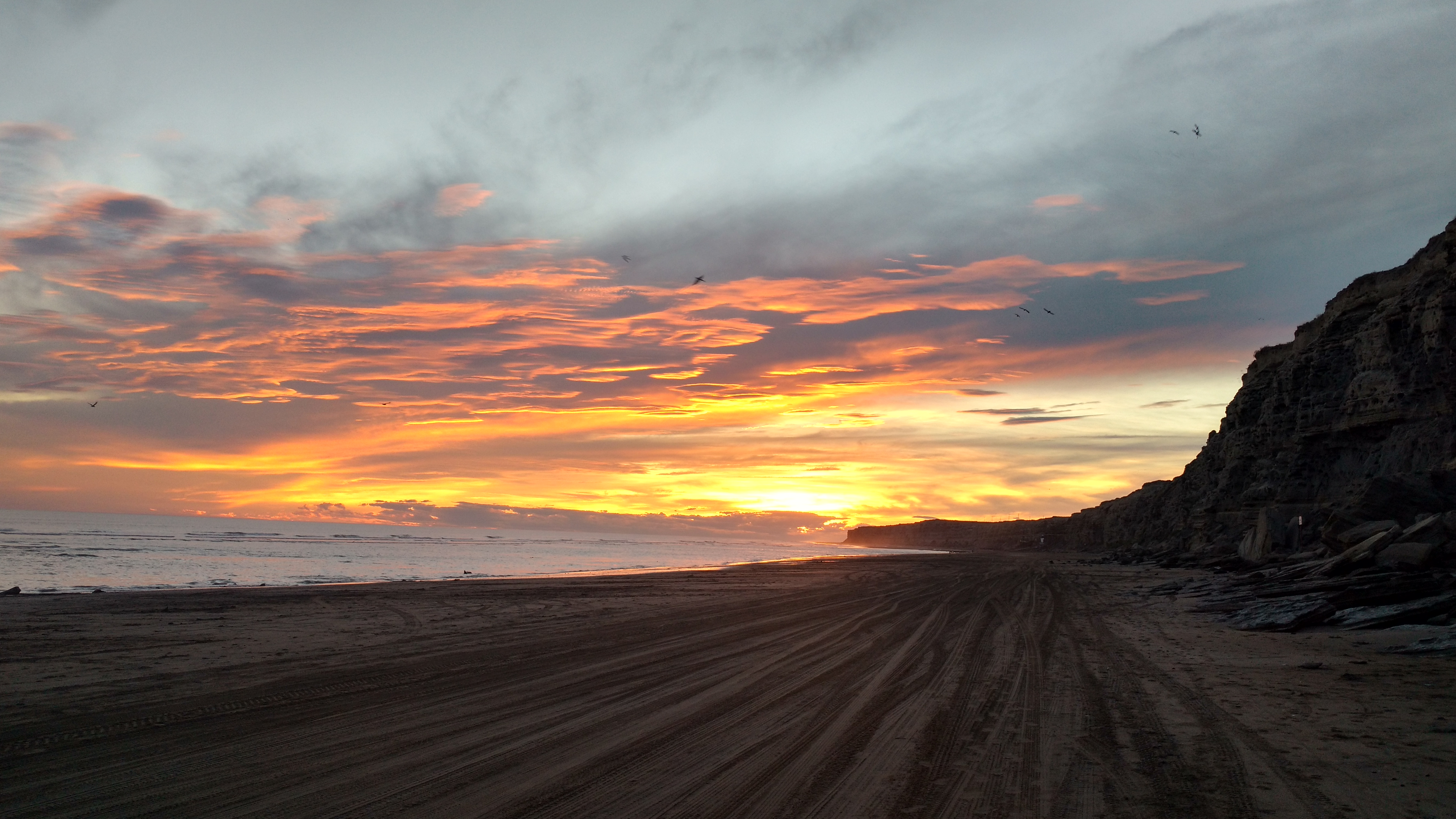 Es el atardecer en el mar, a su derecha se ve la barranca de loros. El cóndor-Rio Negro